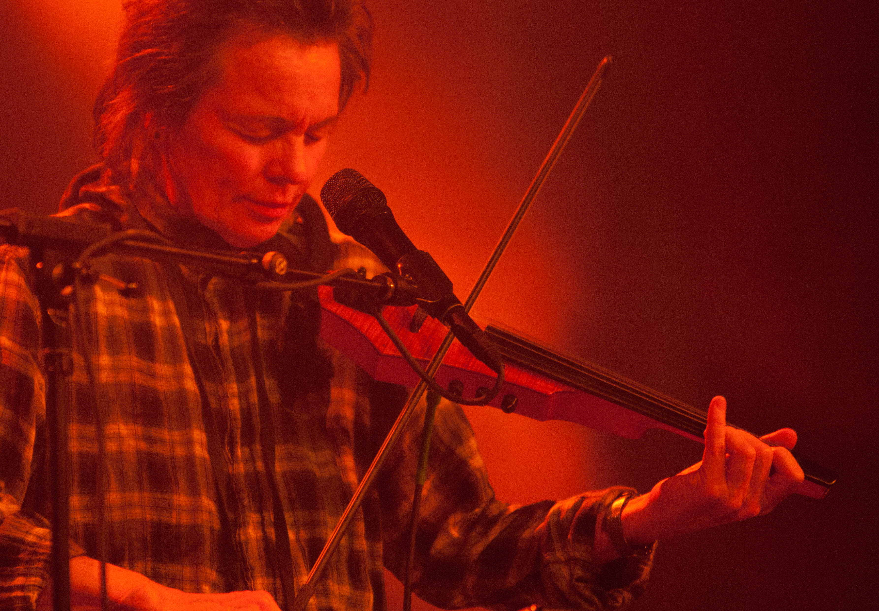 Laurie Anderson at Donaufestival, Krems, Austria